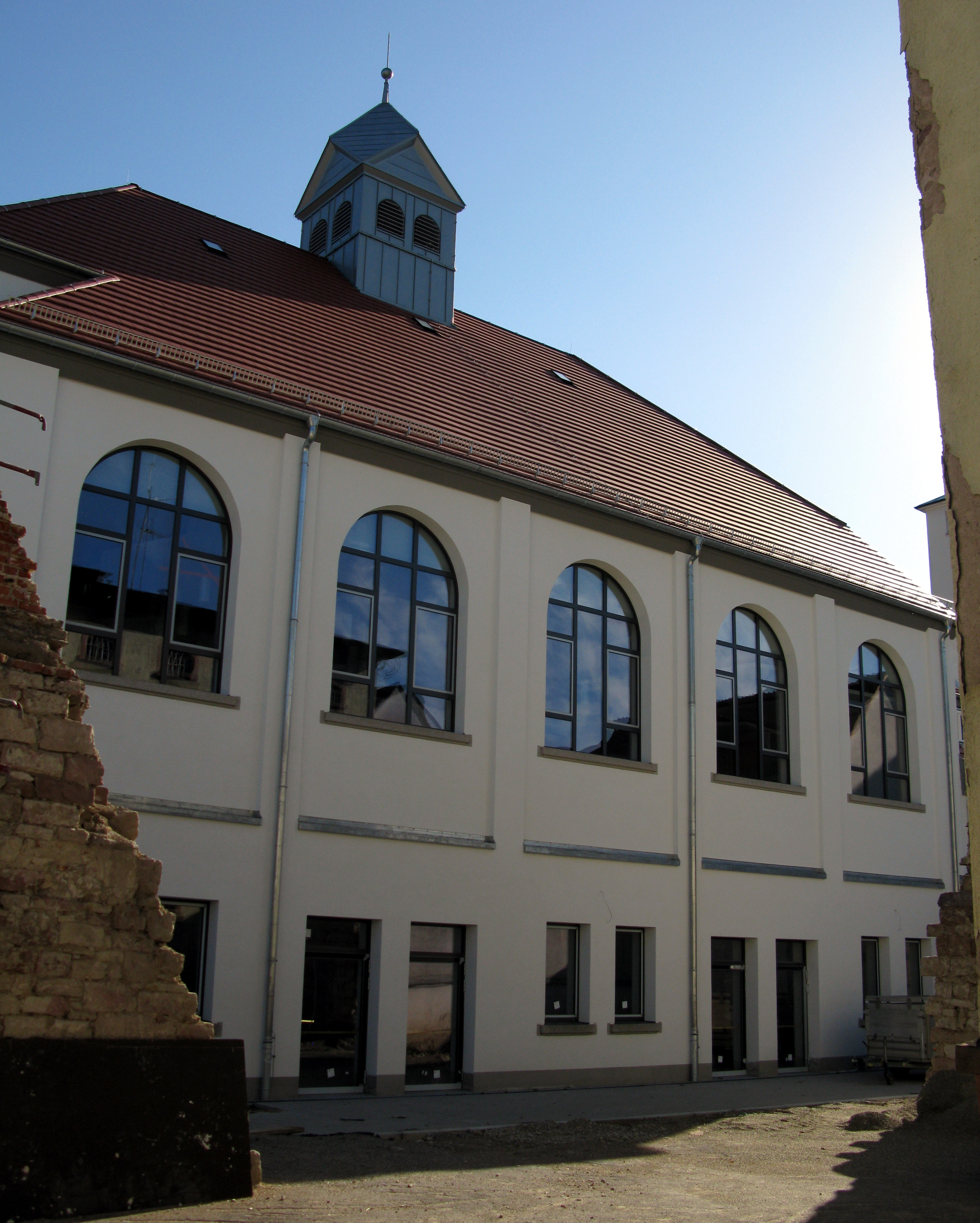 Paulussaal in Freiburg von Norden gesehen